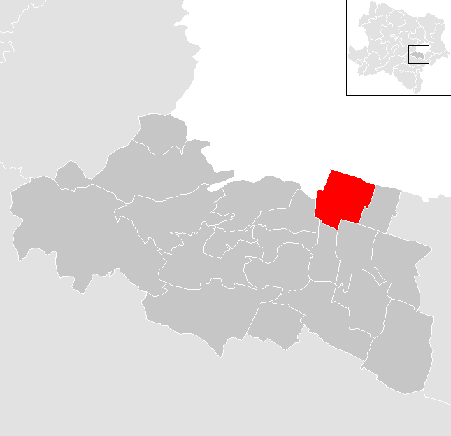 Bezirk Mödling